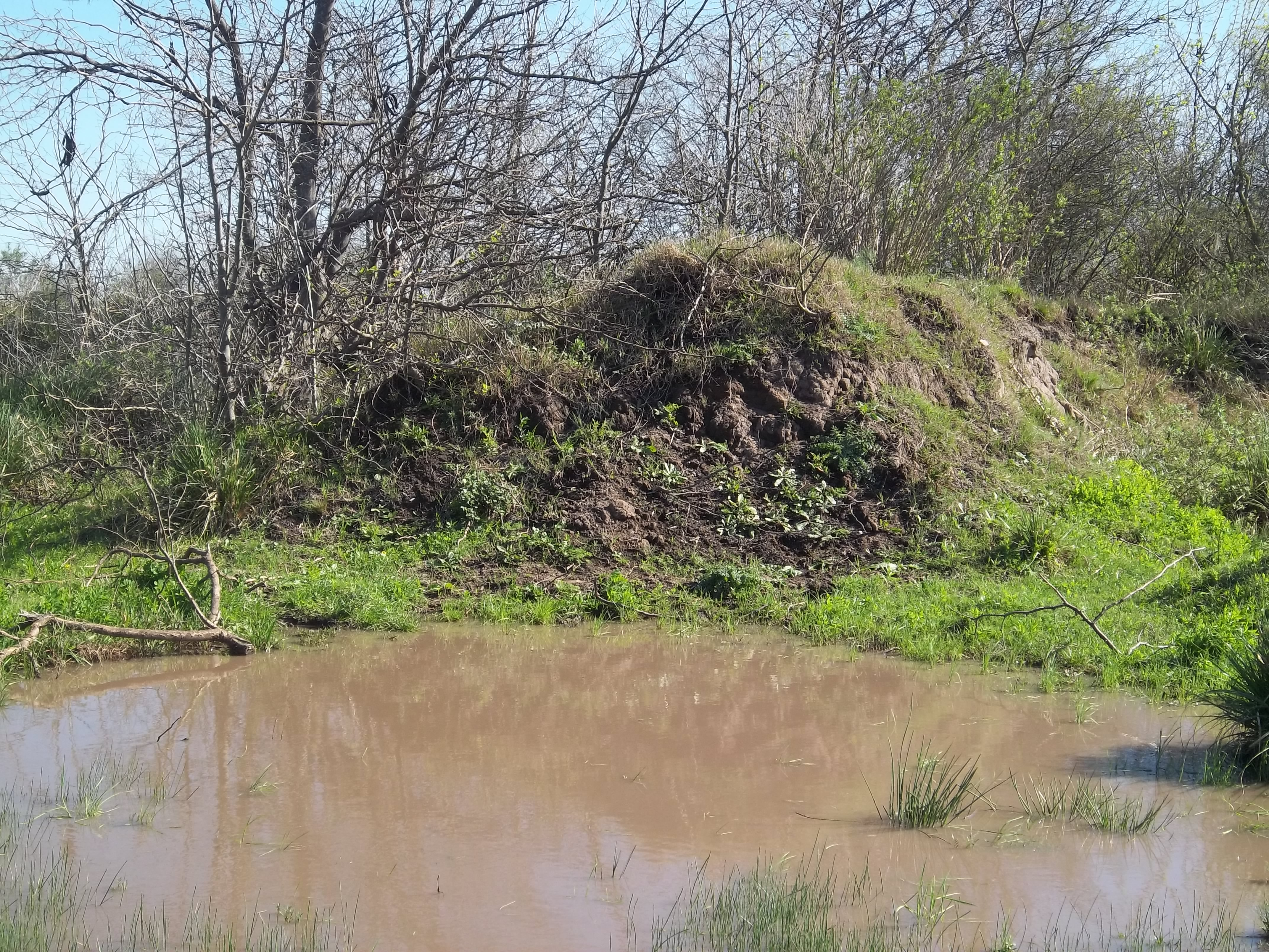 Terraplén del ramal G del Ferrocarril General Belgrano eliminado para habilitar un camino particular hacia un campo. Ubicado en González Catán, partido de La Matanza, provincia de Buenos Aires, Argentina.